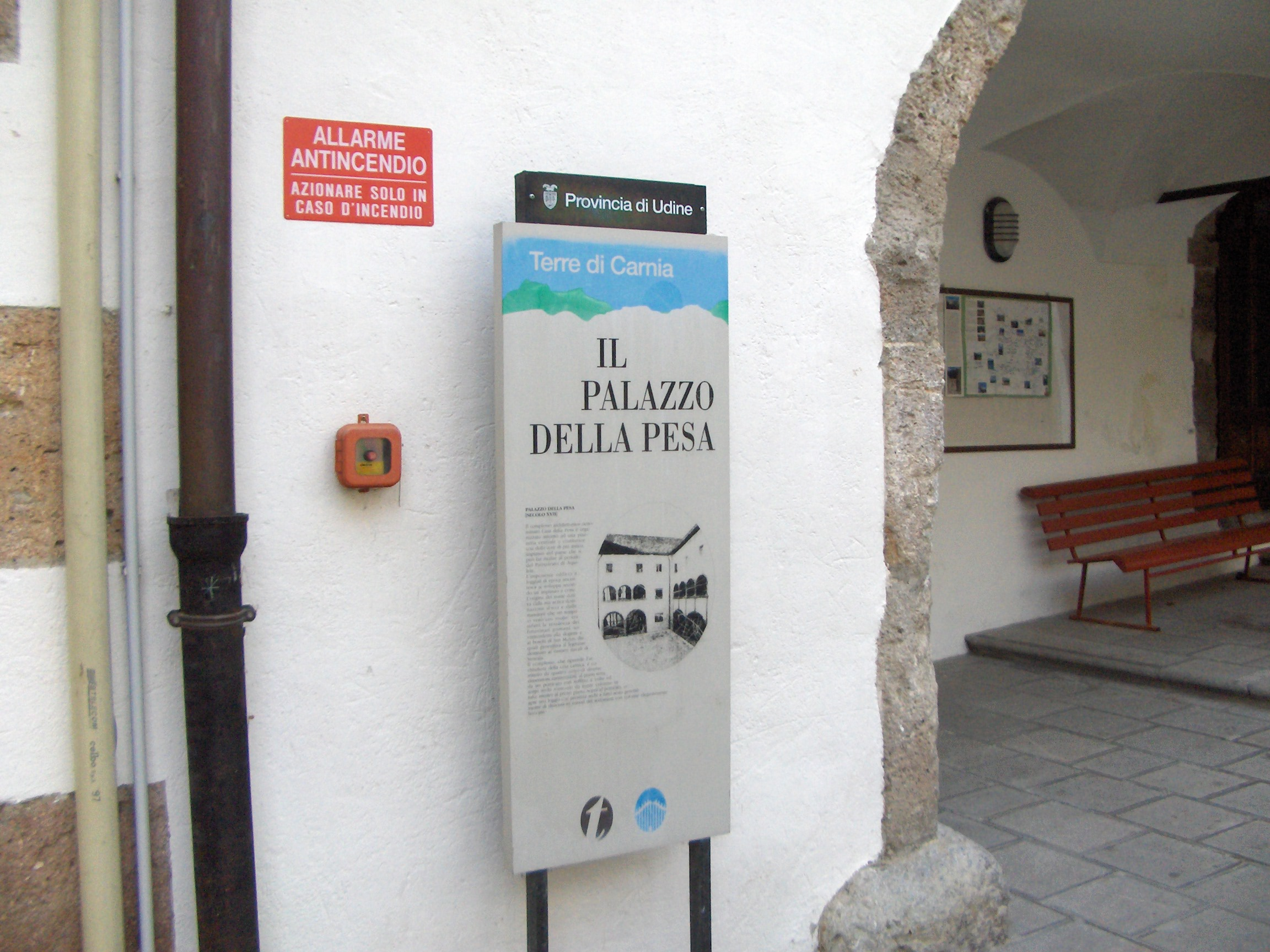 Sebi1, Pesariis (Prato Carnico) il Palazzo della Pesa, cartello informativo